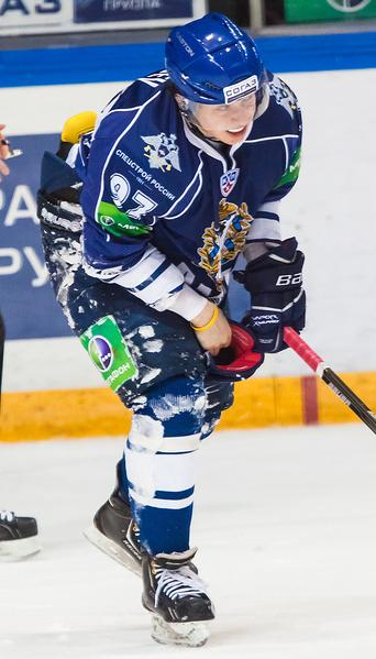 Нападающий хабаровского «Амура» Никита Гусев во время матча чемпионата КХЛ против донецкого «Донбасса» 30 января 2013 года.